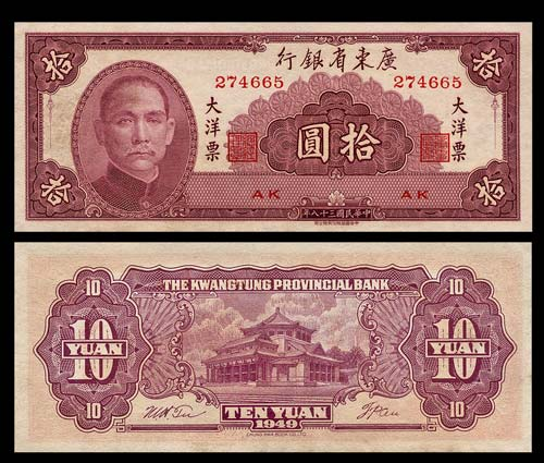 廣東省銀行大洋票拾圓